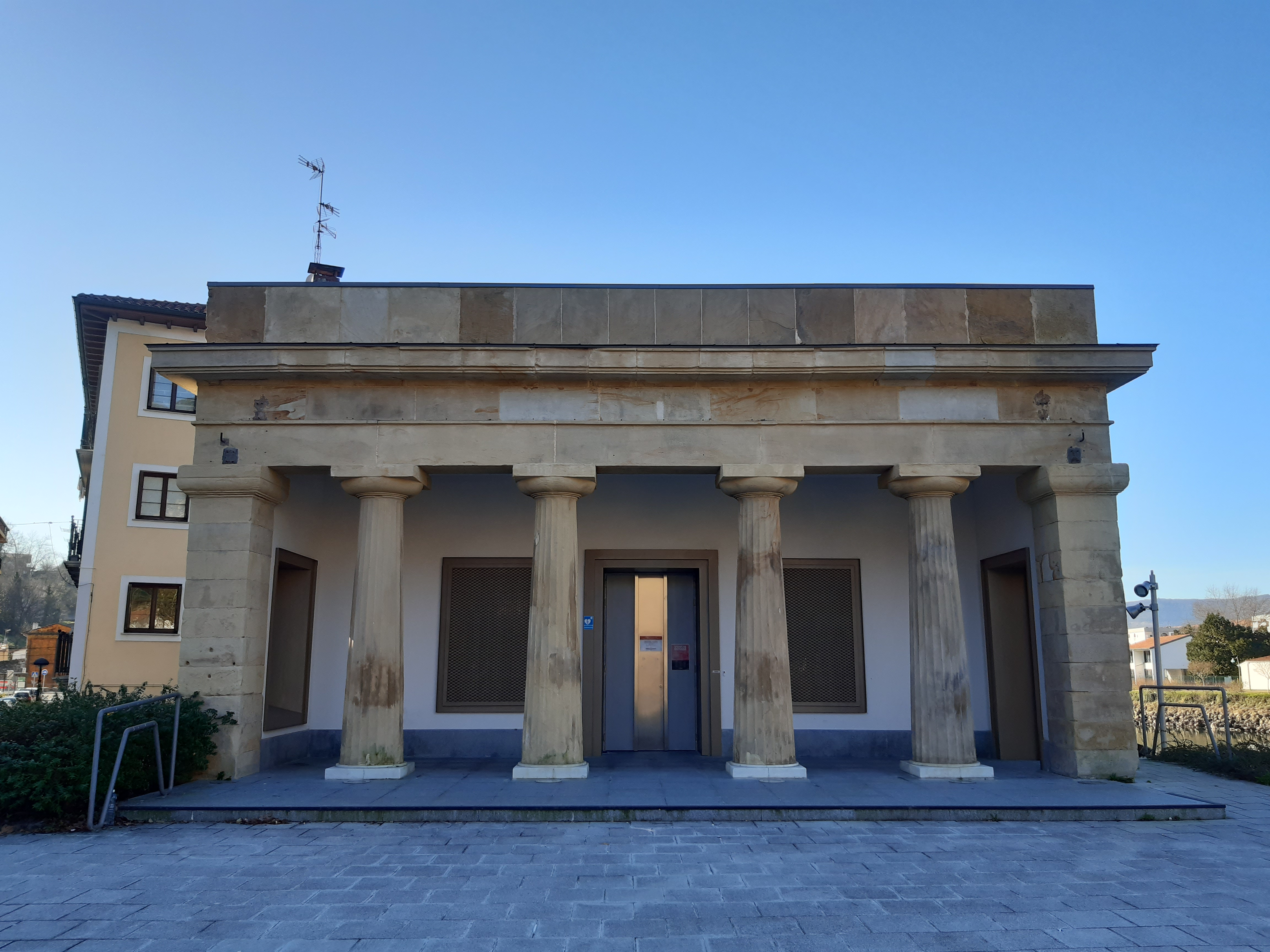 Behobiko Guarda Etxe zaharra